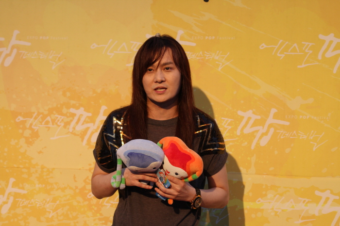 가수 김경호